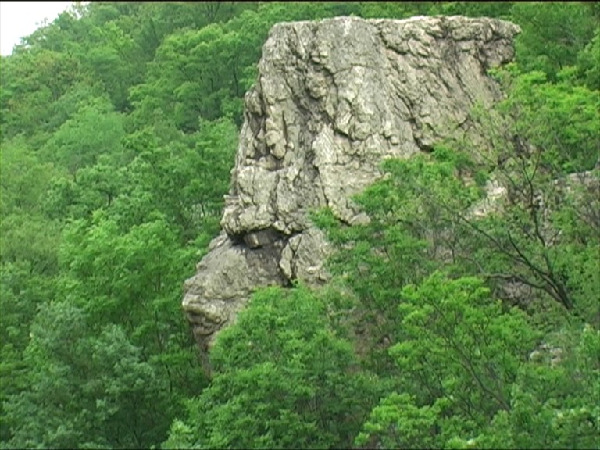 Sfinxul reprezinta o figura dacica, un cap de om cu un coif dacic orientat cu fata spre vest .